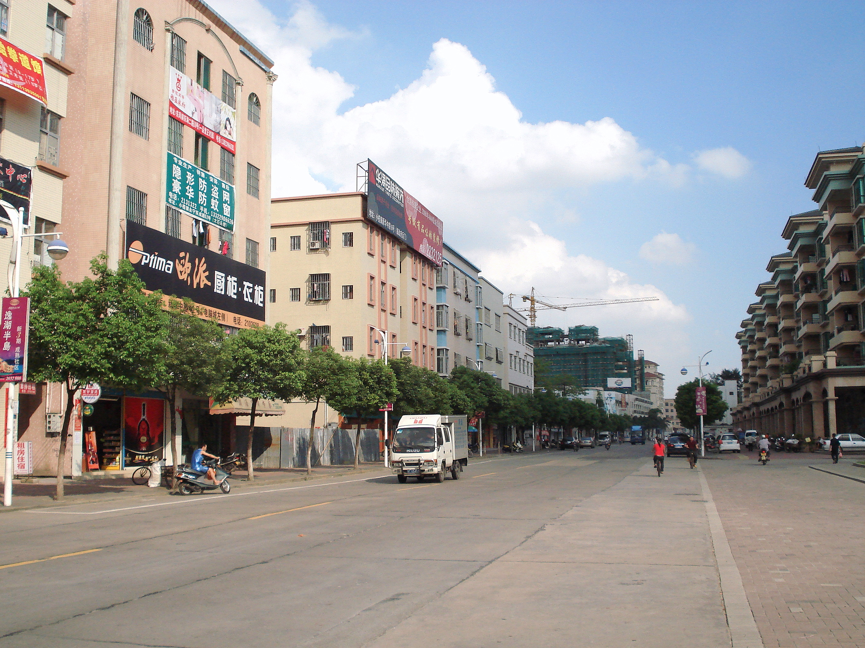 中文（香港）: 中山市東鳳鎮東海路之街景